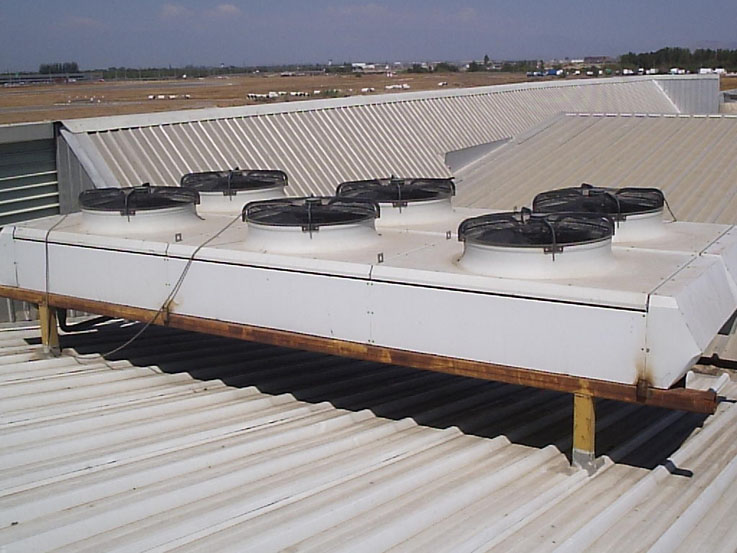 Condensadores de tubo aleteado enfriados por aire en instalación industrial de R-22